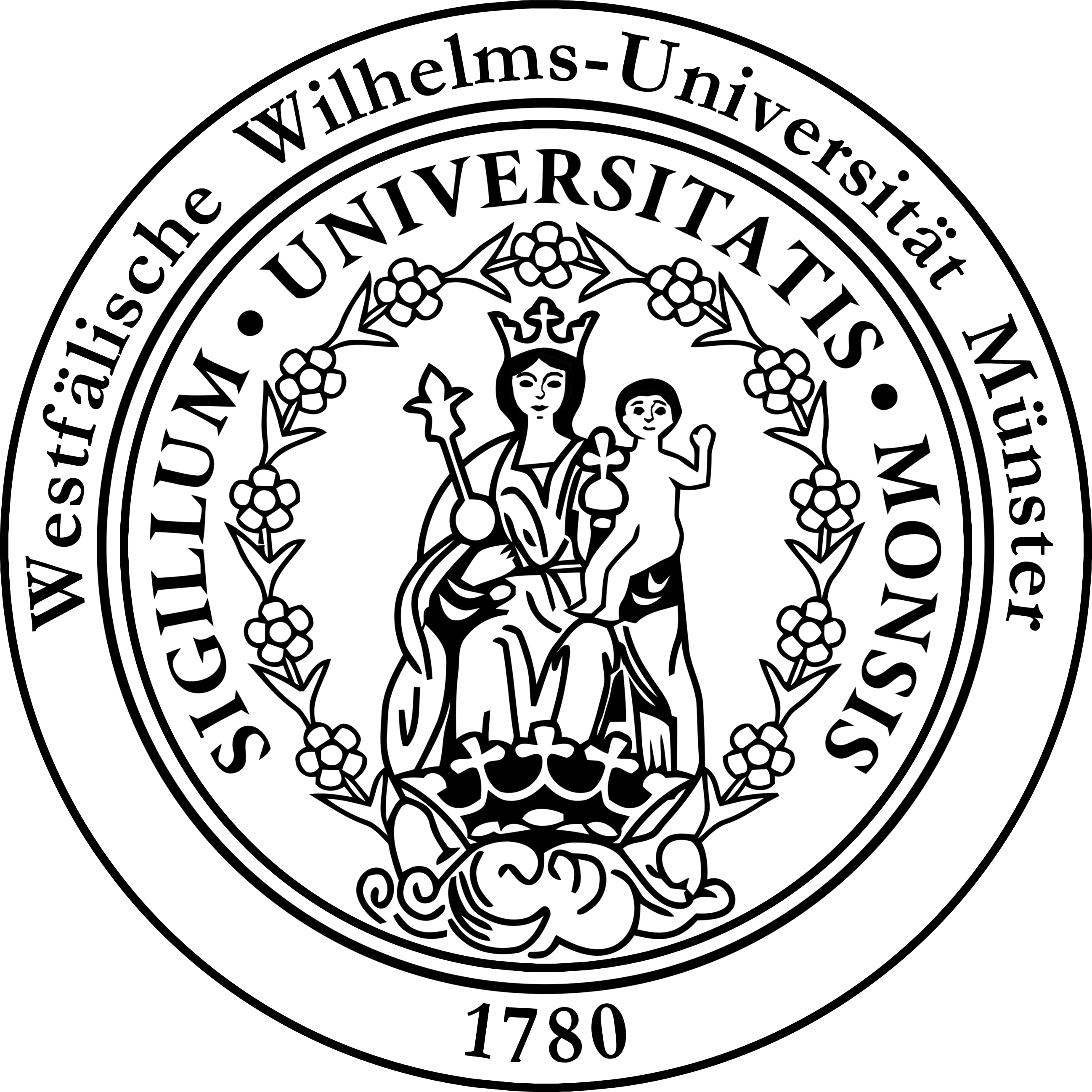 Siegel der Westfälischen Wilhelms-Universität Sonstiges: Siehe auch Siegel der Universität zu Köln